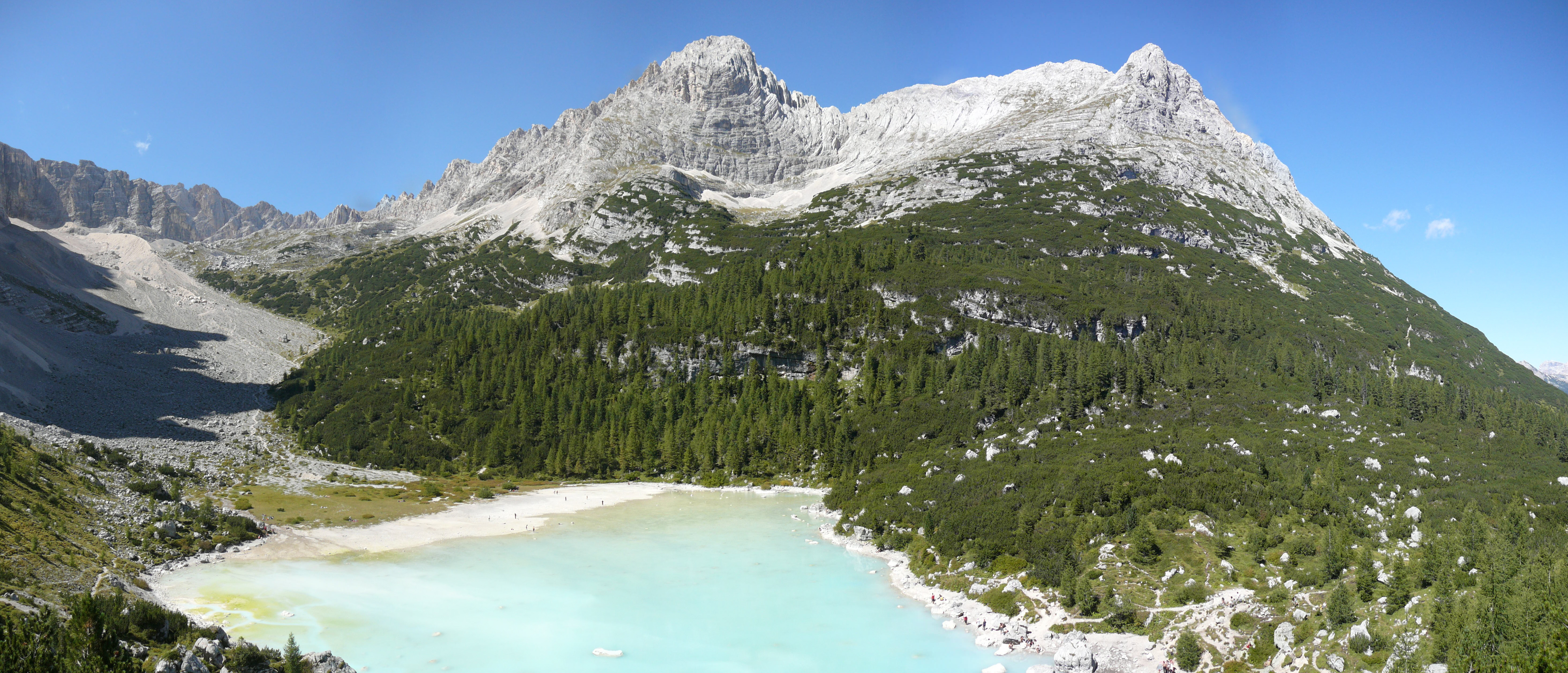 sorapiss e lago